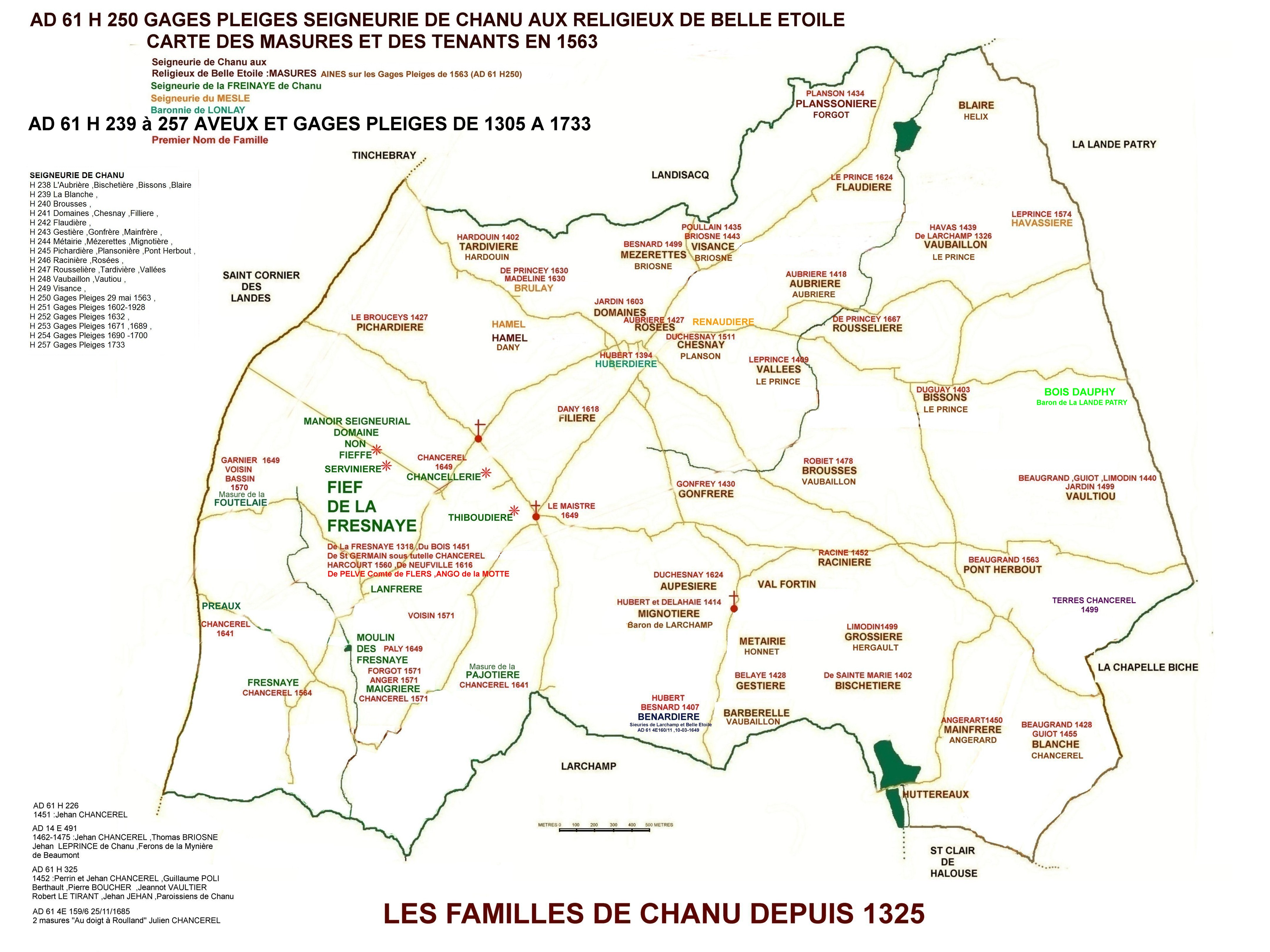 Les familles de Chanu dans les archives de l'Abbaye de Crisy-Belle-Etoile